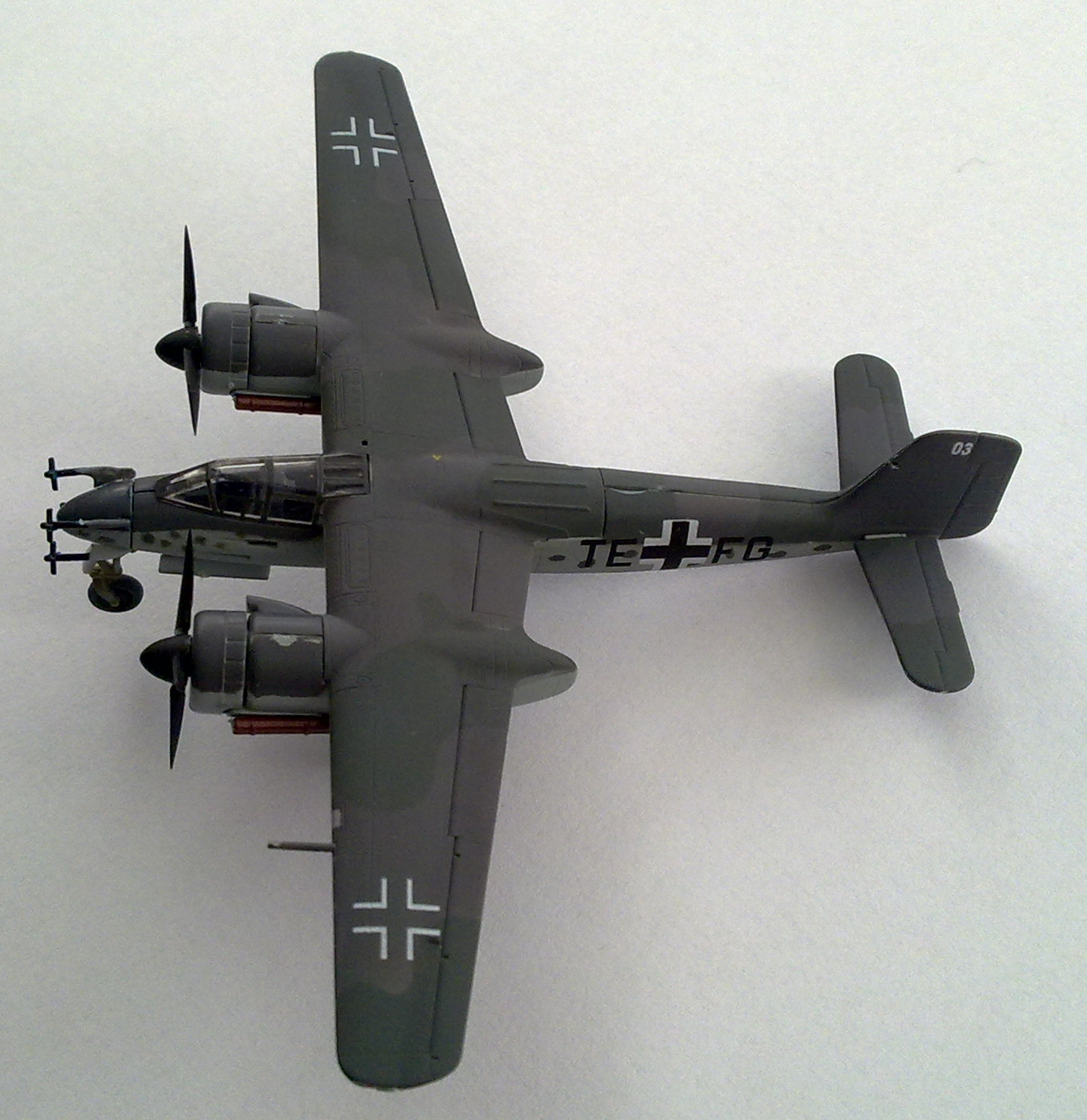 Vertikalblick auf die Ta 154